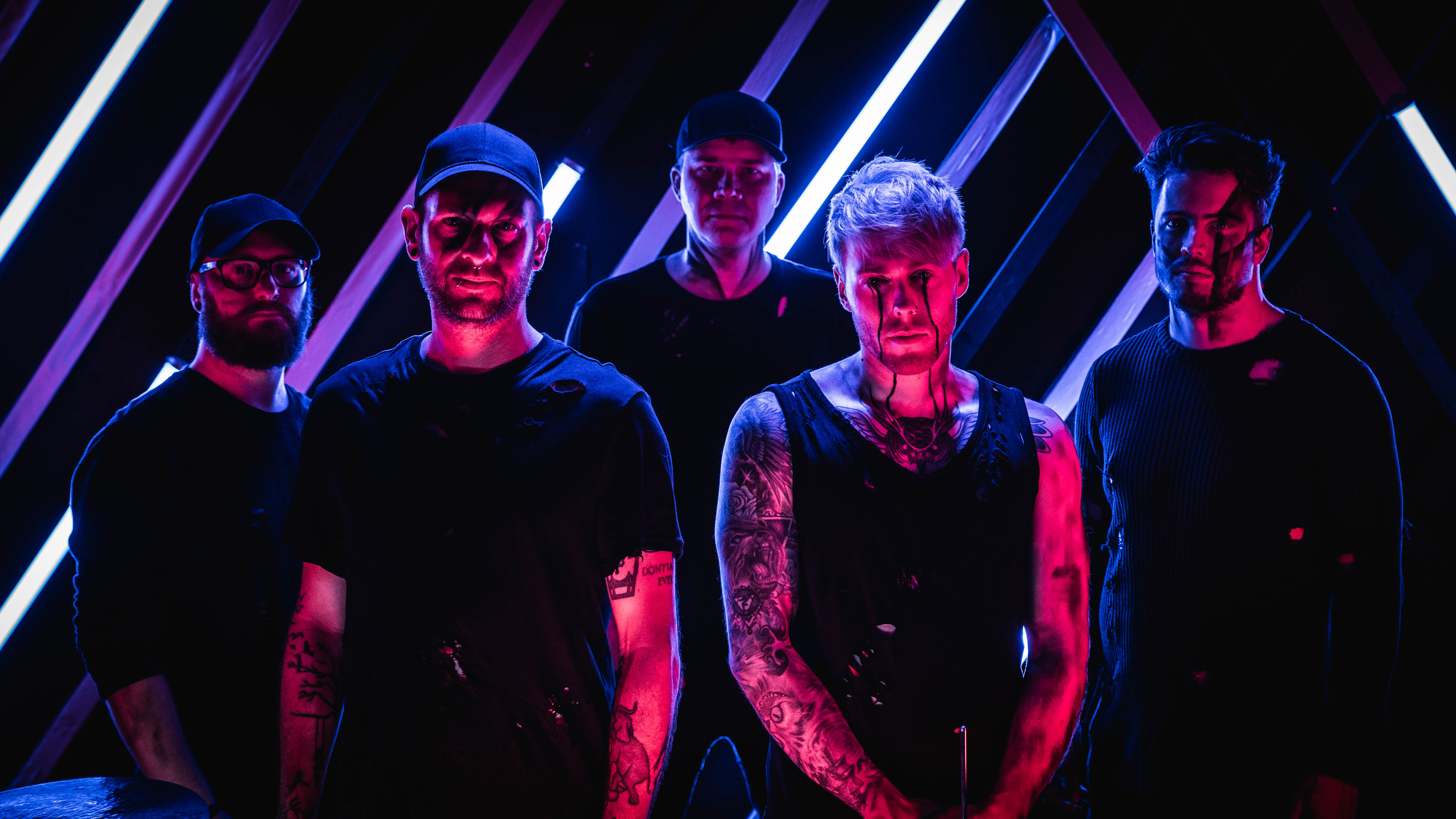 Horror Dance Squad 2020